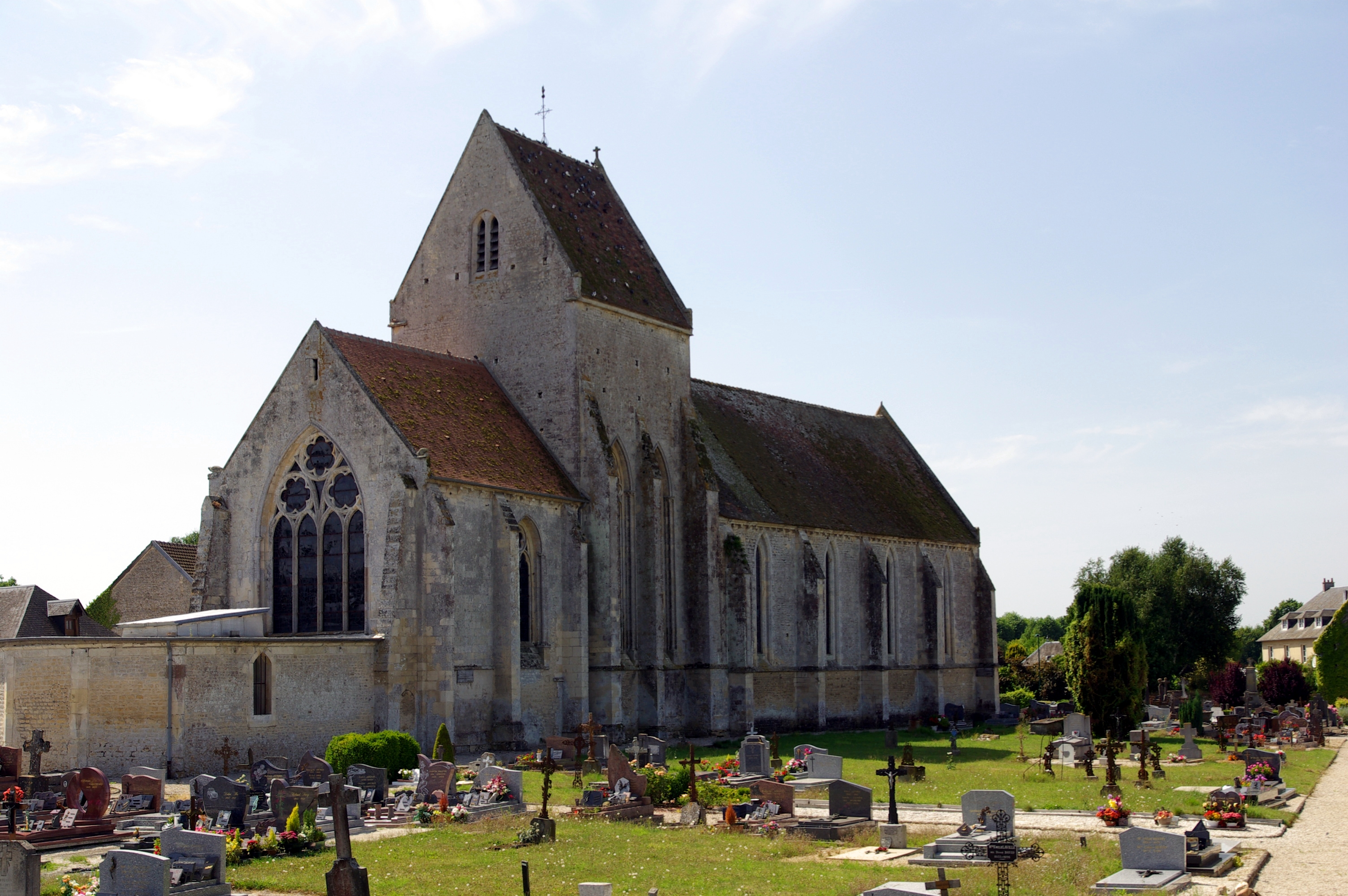 L'église Saint-Martin, Ussy, Calvados.